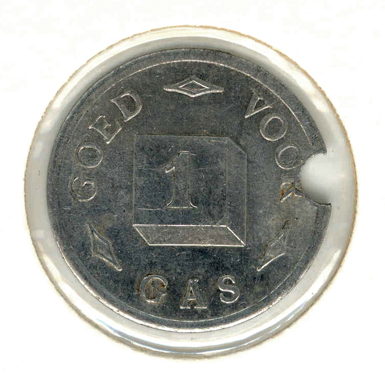 Gaspenning Almelo - achterzijde. Diameter 23,5 mm